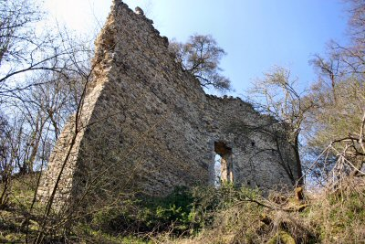 Domburg im Hakel